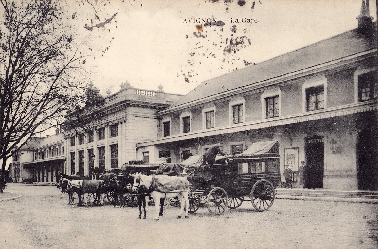 Carte postale ancienne sans mention d'éditeur : AVIGNON - La Gare